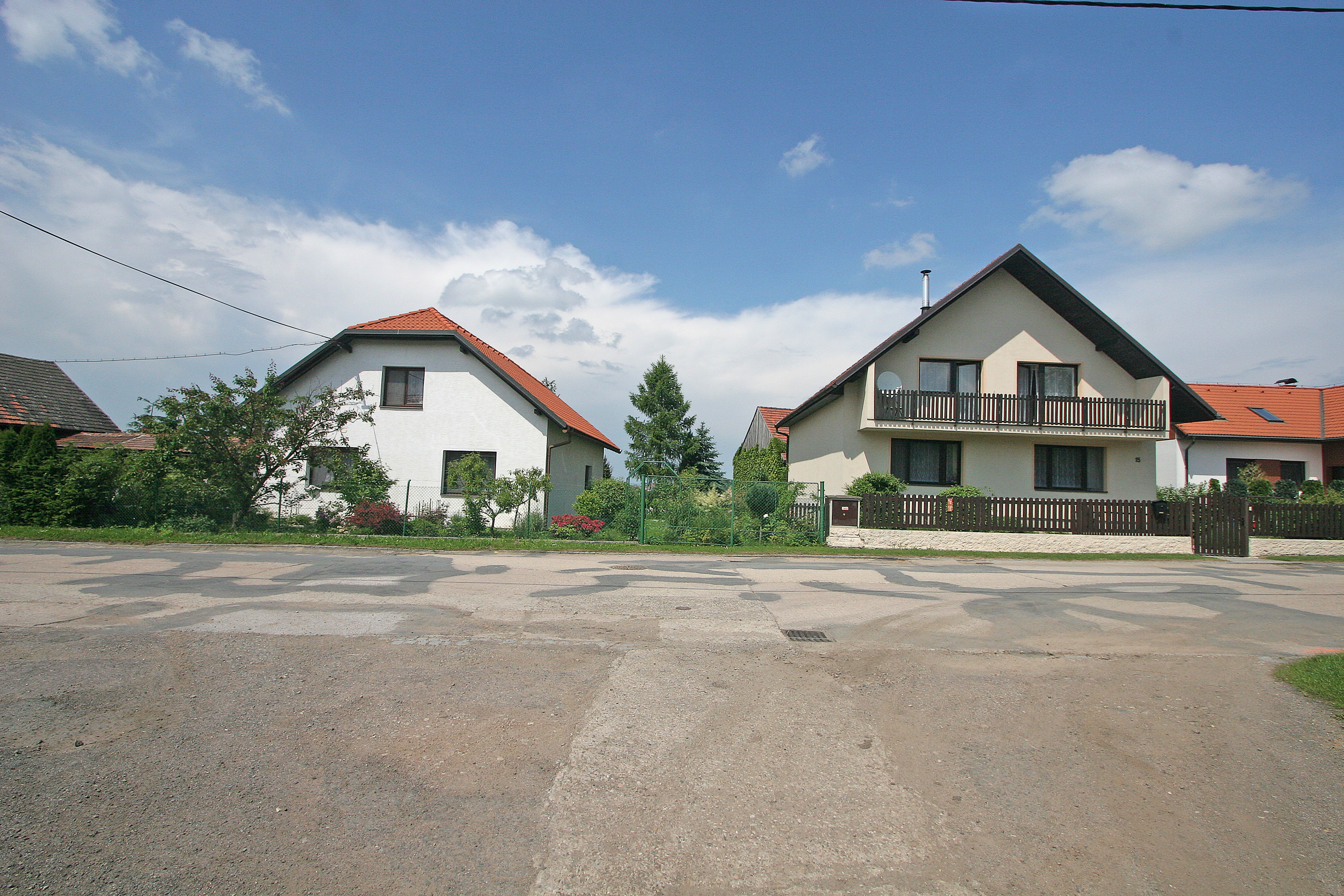 Horní Přím čp. 26 a 15